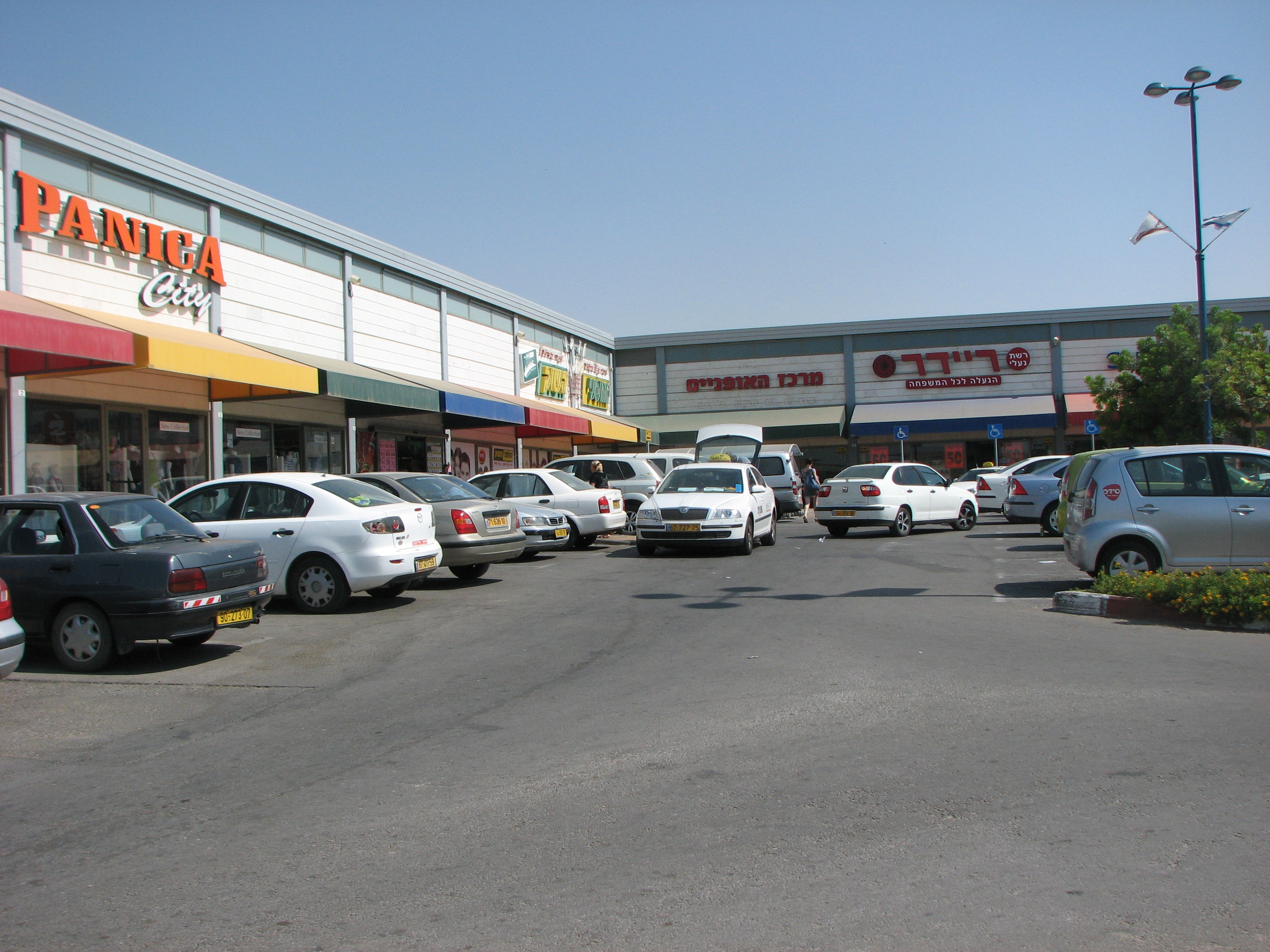 המרכז המסחרי החדש בעיר he:אופקים